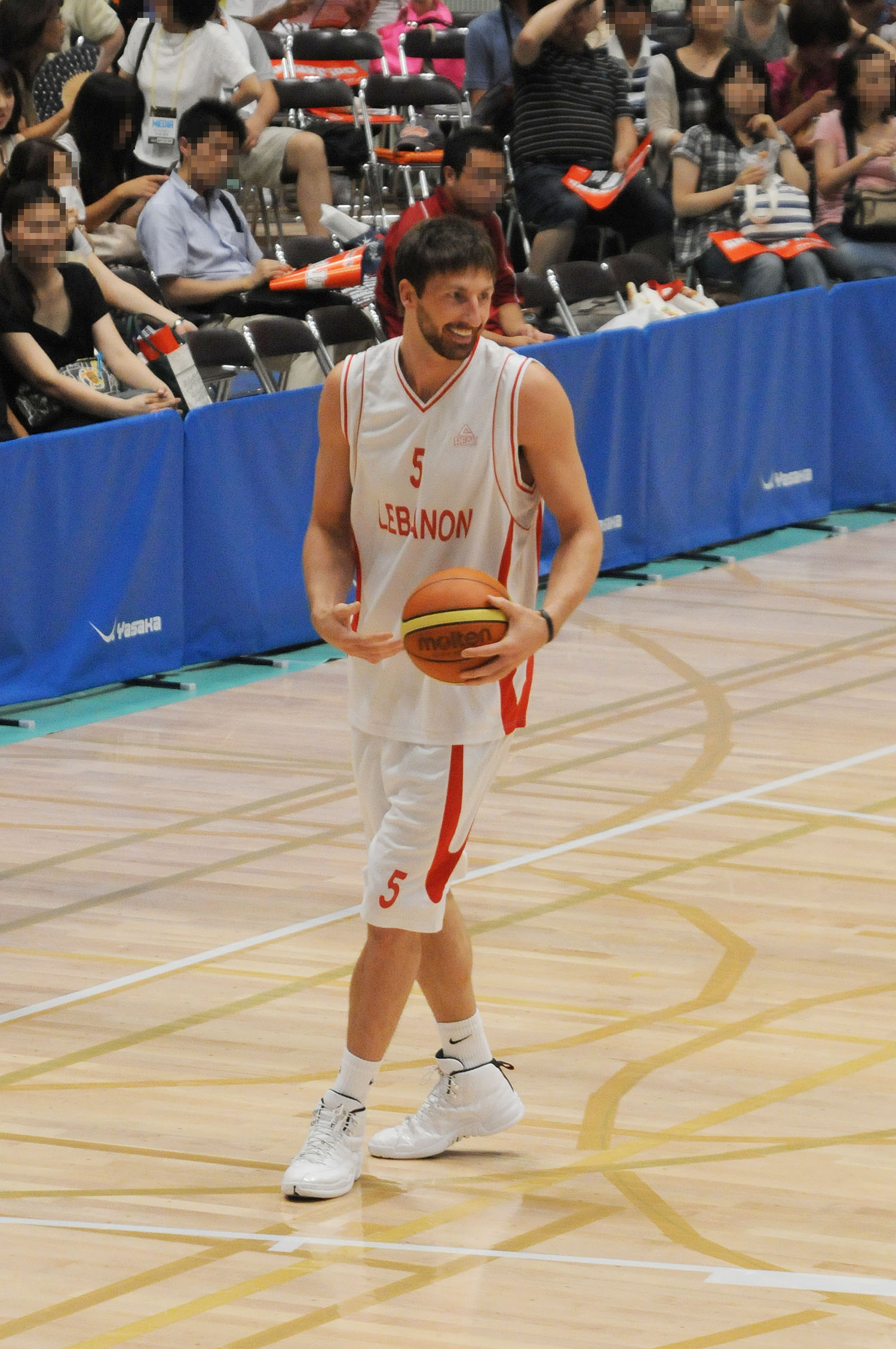 レバノン代表、ジャクソン・ブロマン選手。墨田区総合体育館で。